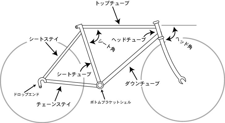 bike frame